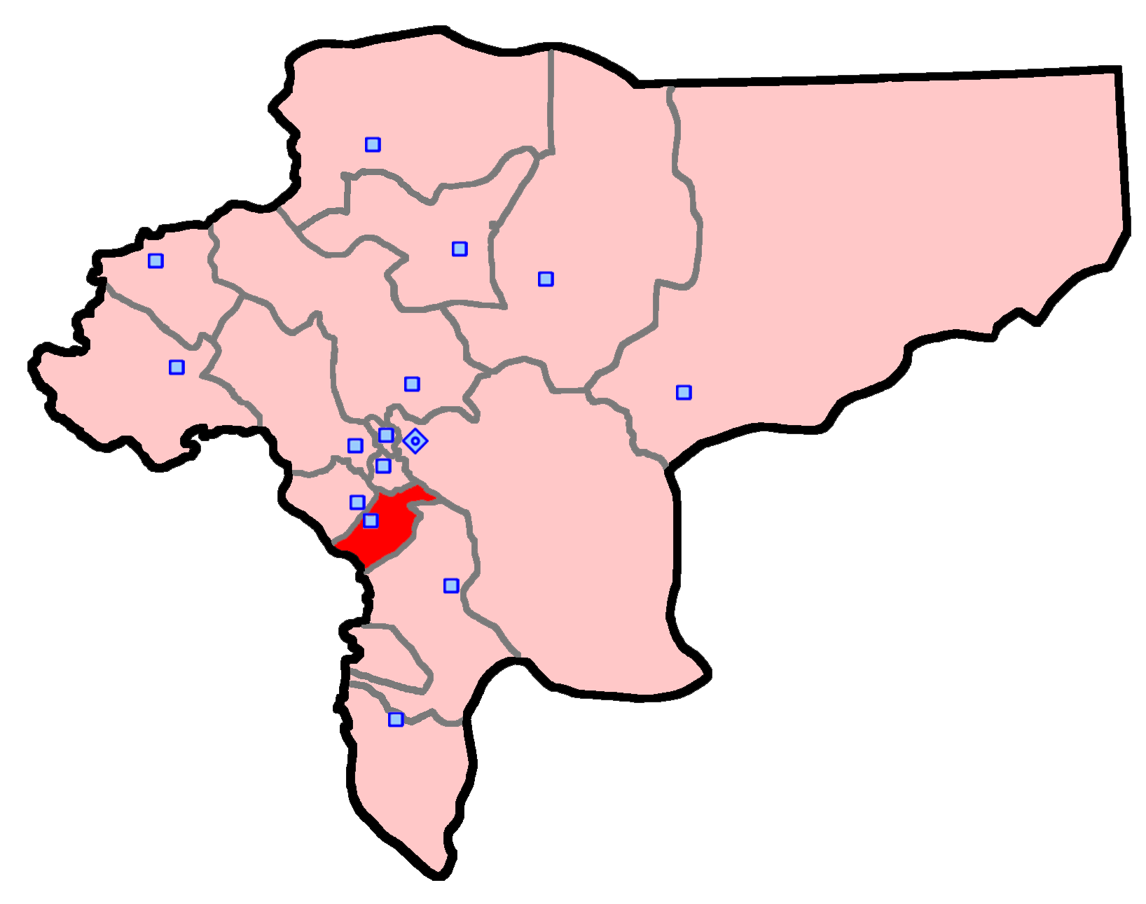 حوزهٔ انتخاباتی مبارکه برای انتخابات مجلس شورای اسلامی